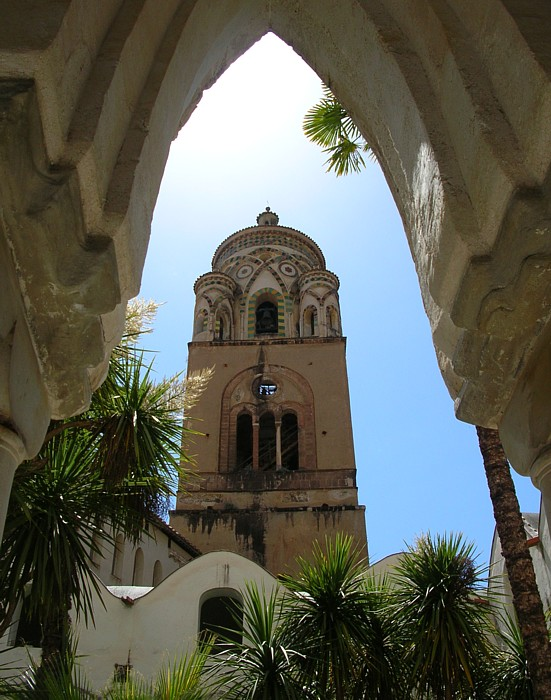 Dom van Amalfi